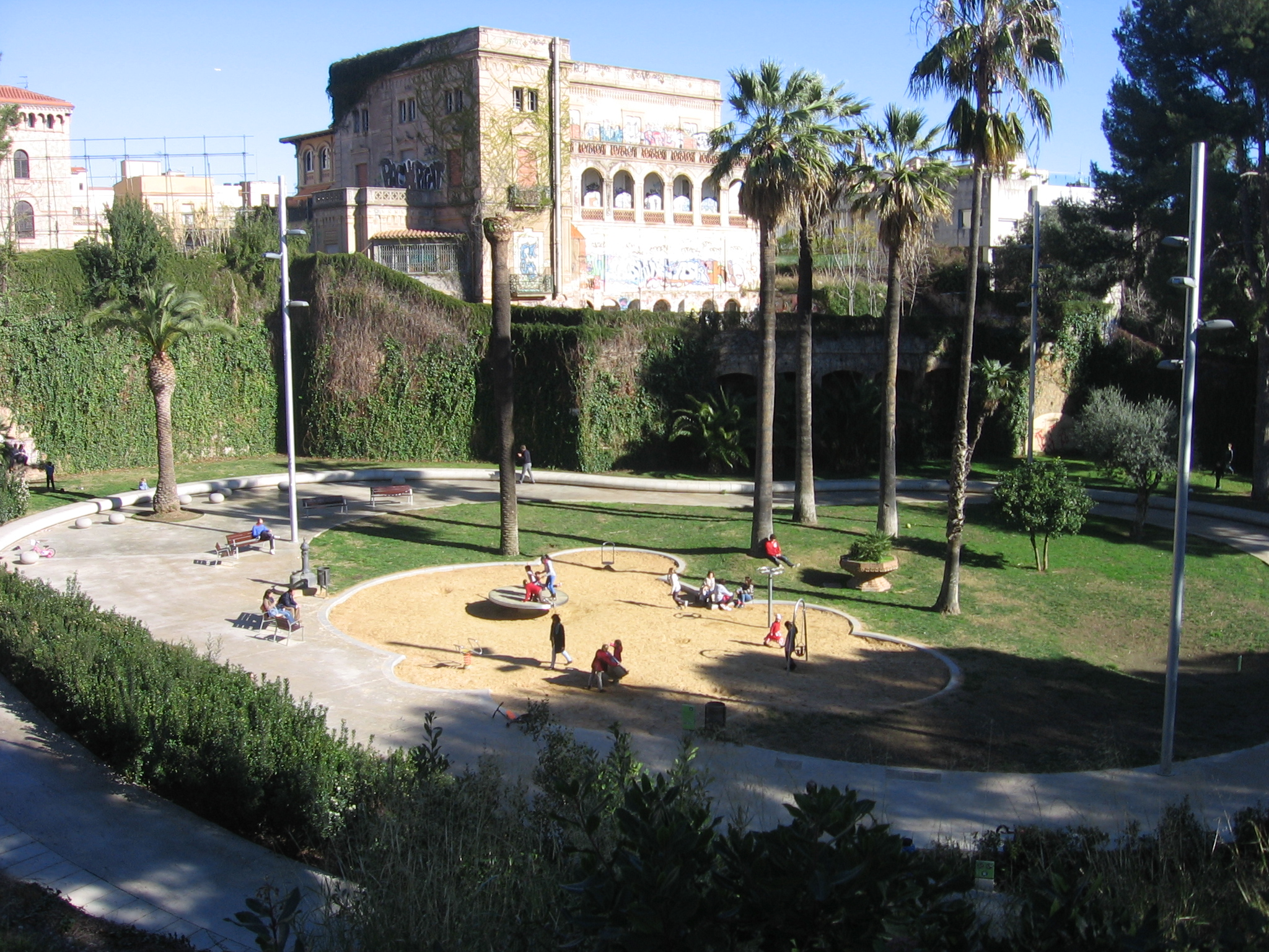 Parque de Joan Reventós